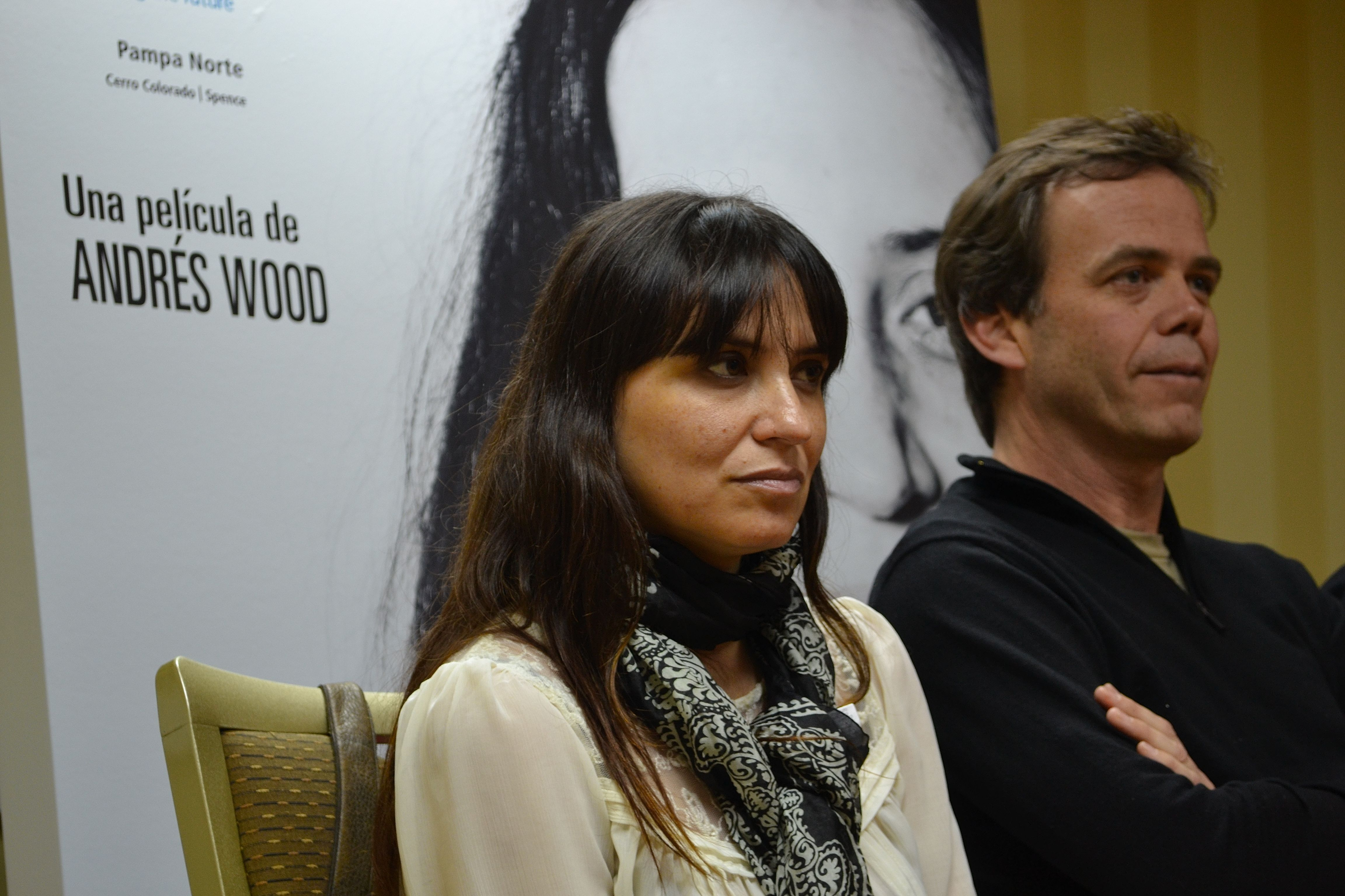 Francisca Gavilán y Andrés Wood, protagonista y director de la película chilena "Violeta se fue a los cielos".